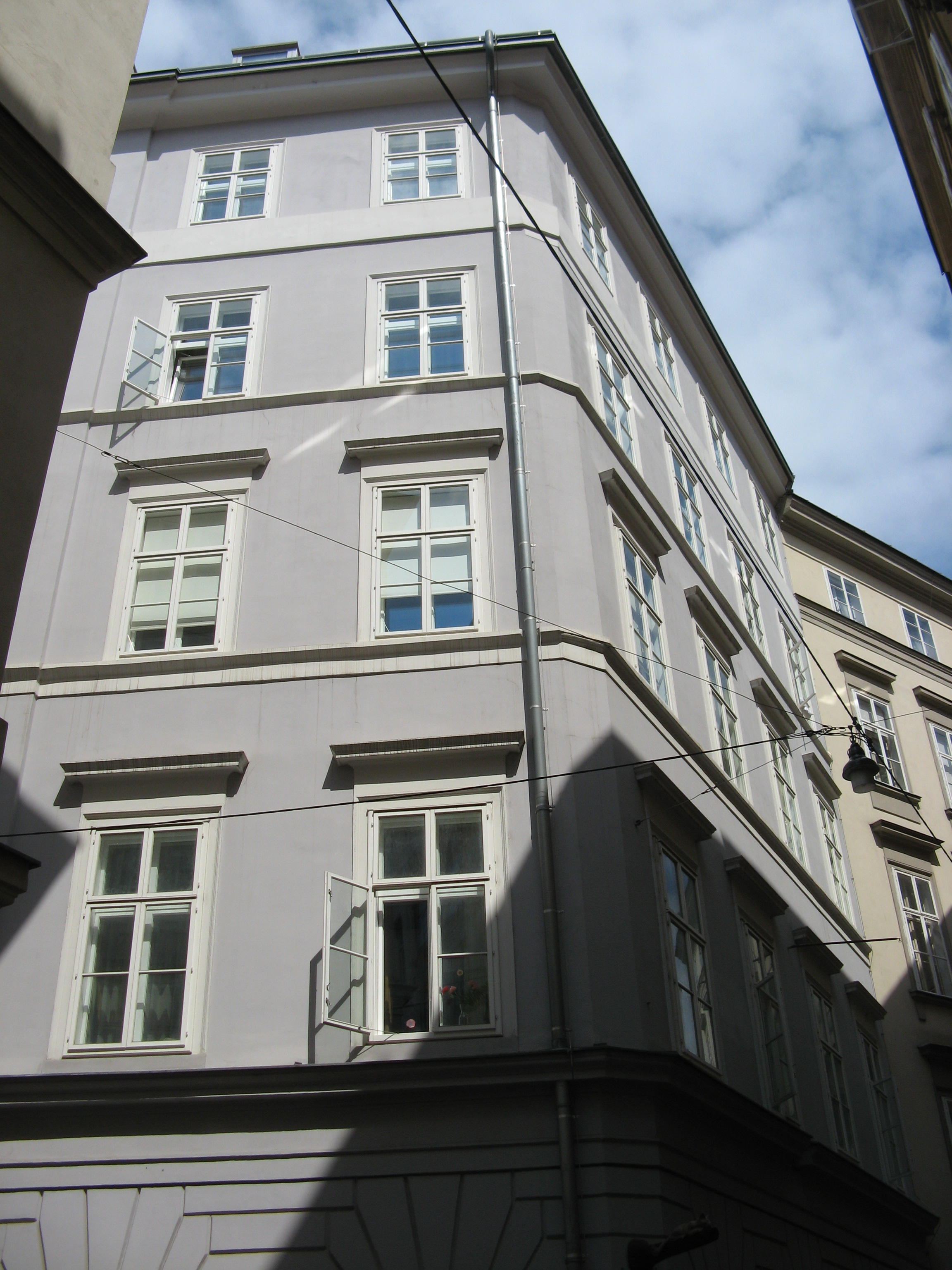 Haus Zur Hl. Dreifaltigkeit (1832), Blumenstockgasse 5/Ecke Ballgasse, Wien-Innere Stadt